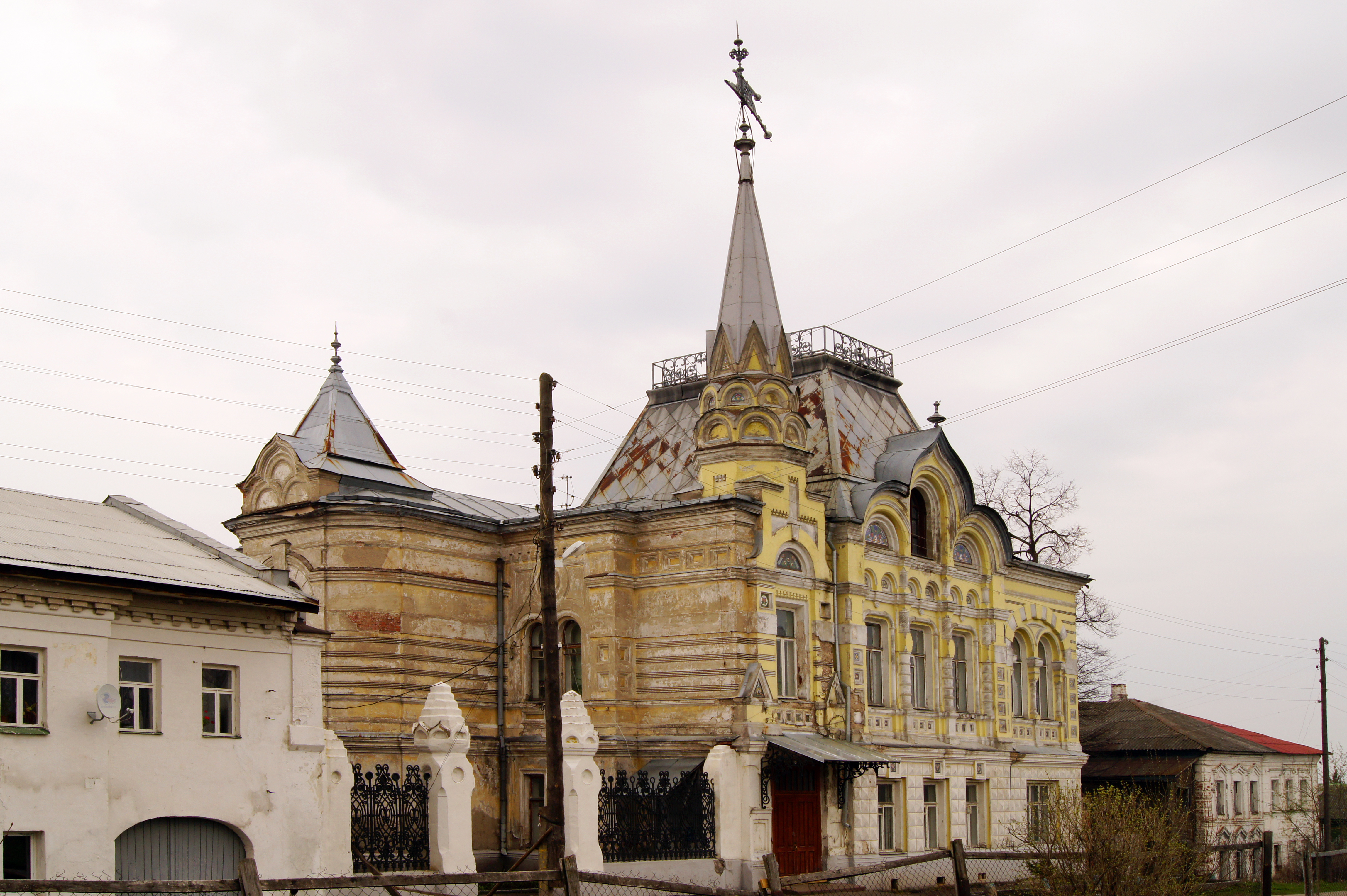 Lokalov House Velikoe